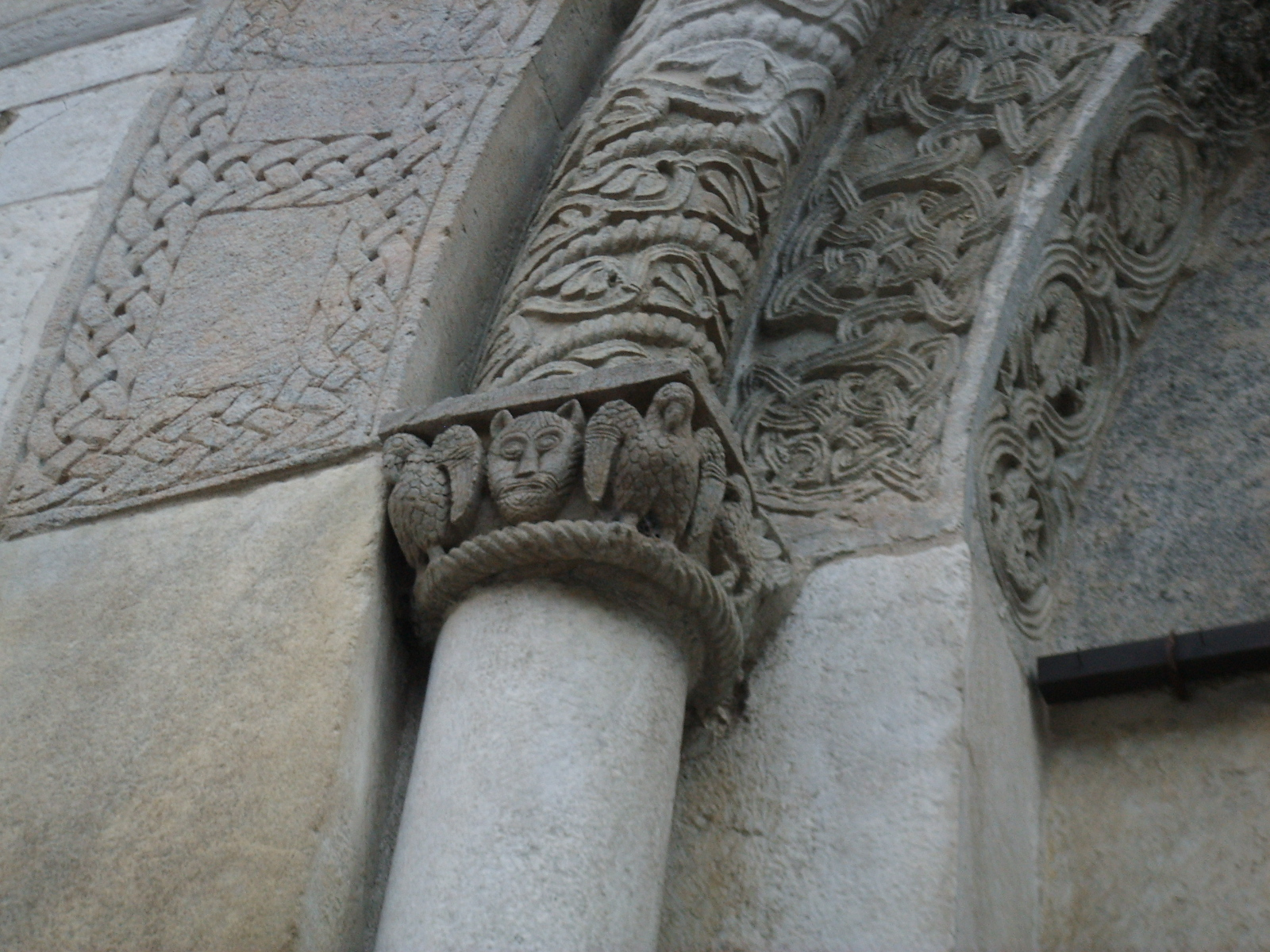 Dettaglio del portale principale della facciata della Basilica di Sant'Abbondio a Como.